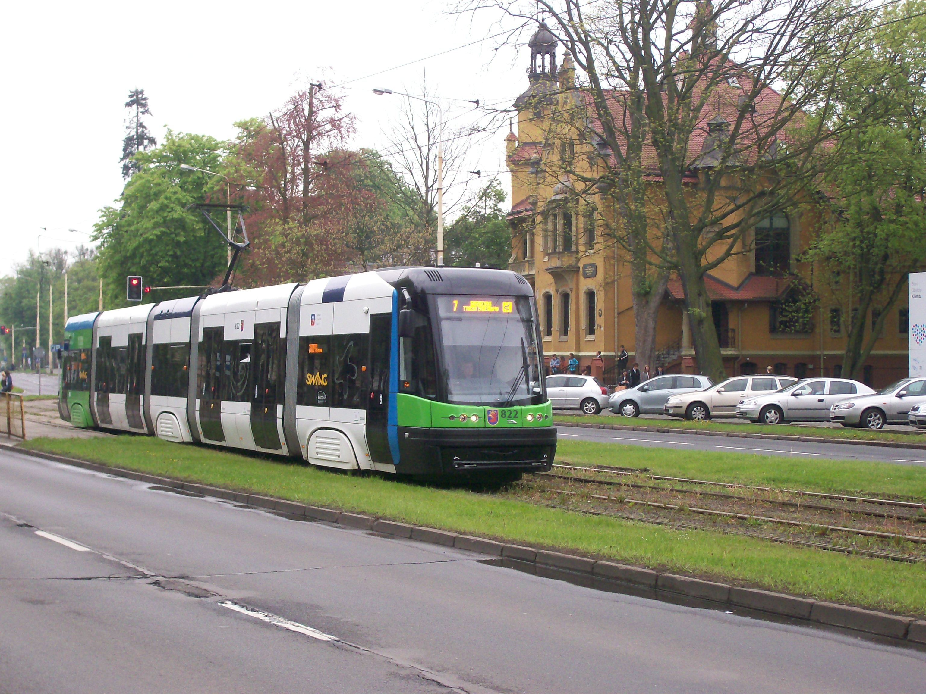 Swing 120Na w Szczecinie